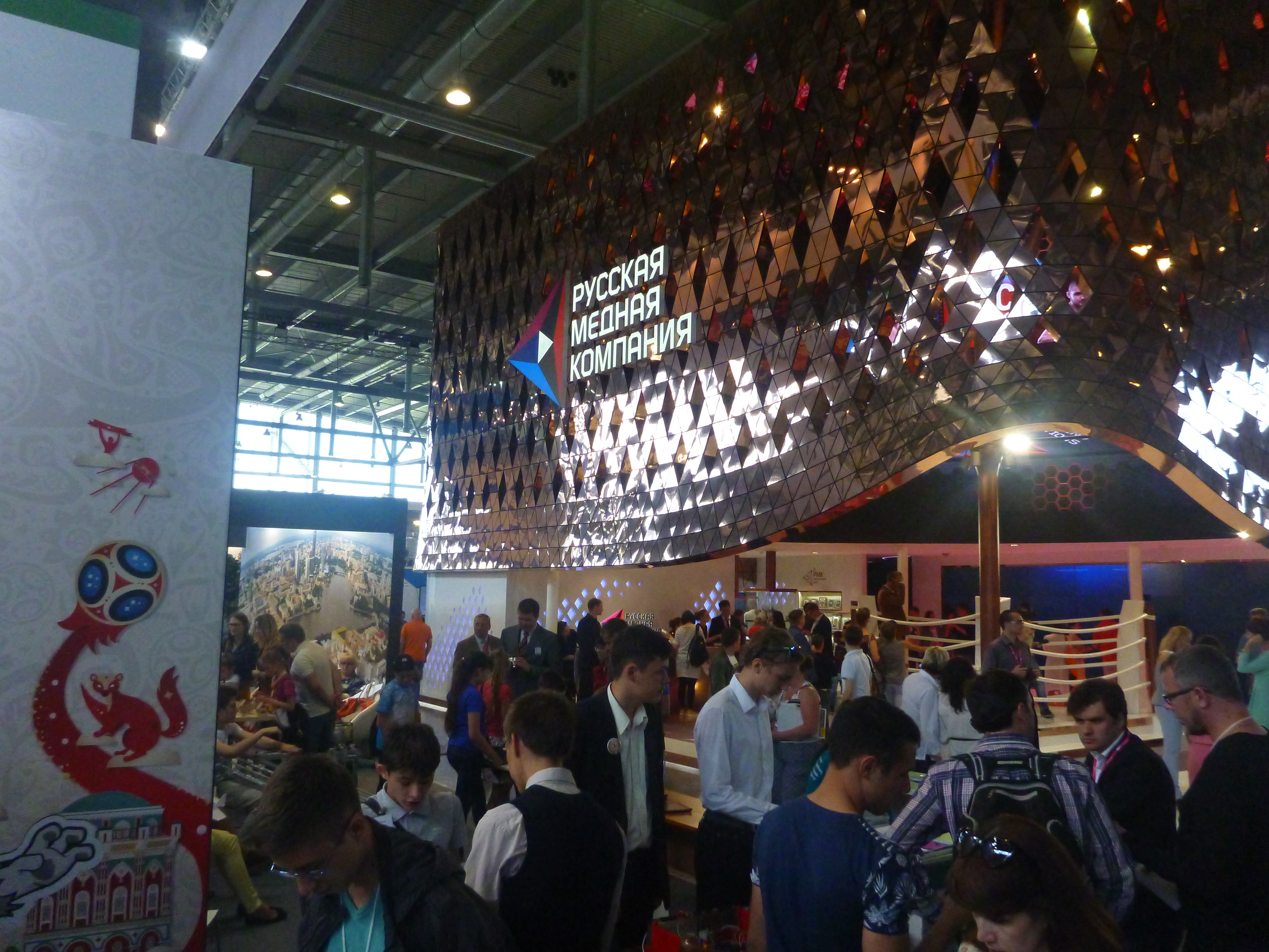 Иннопром-2017